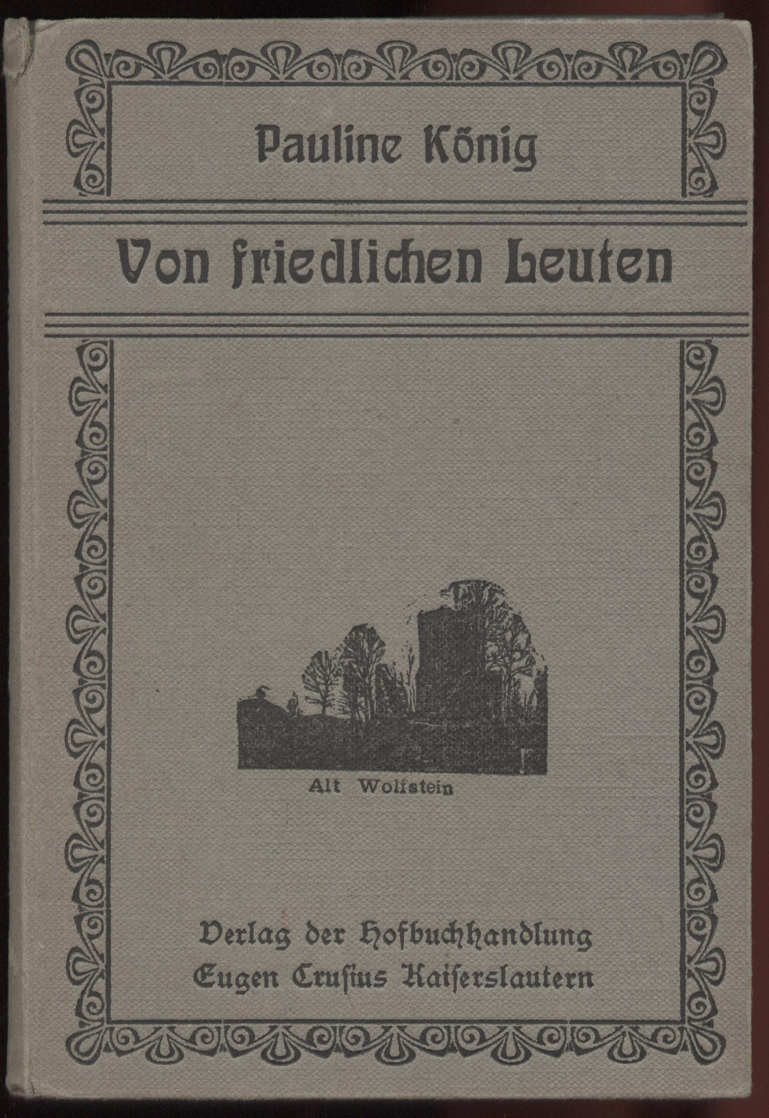 Pauline König, pfälzer Heimatdichterin, Buchcover